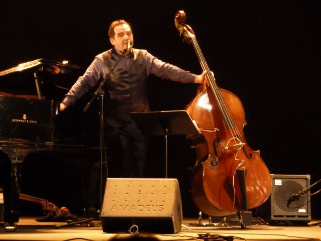 Le contrebassiste Pierre Boussaguet avec son instrument.